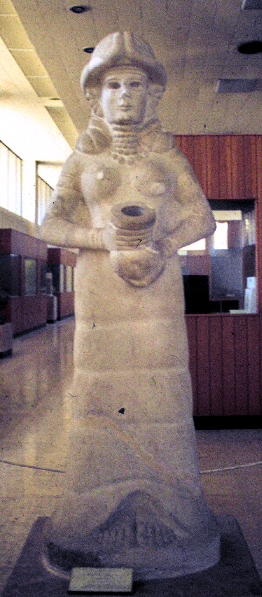 Statue de la déesse au vase jaillissant provenant de Mari (Musée d'Alep) (1980)